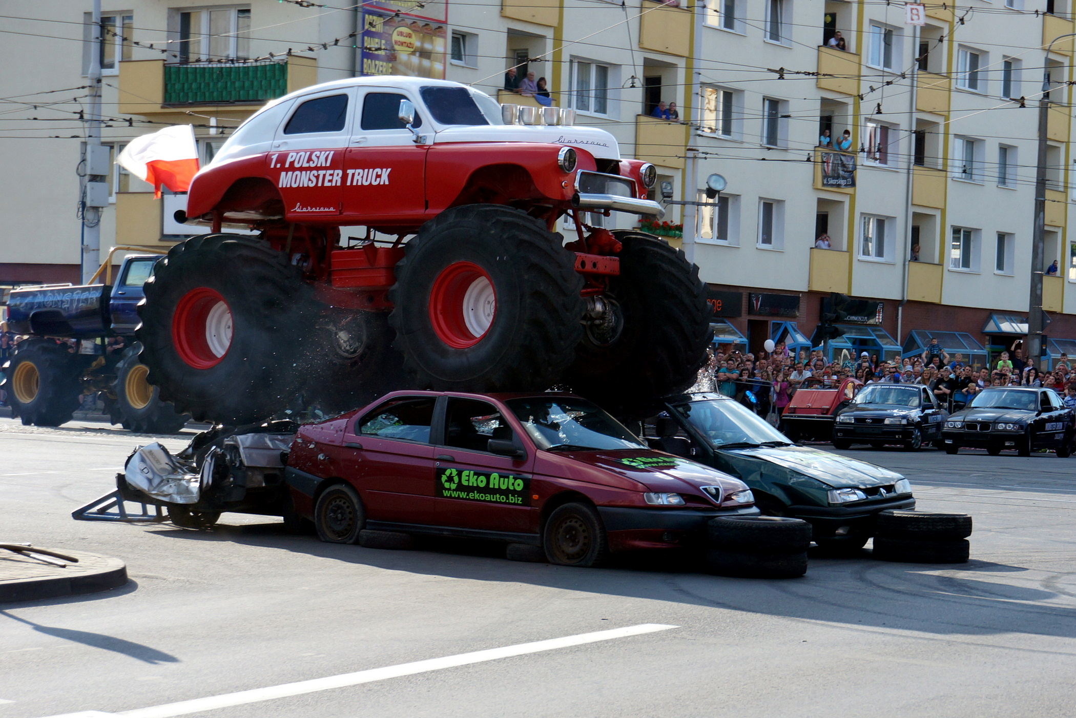 Monster Truck z nadwoziem Warszawy M20 podczas pokazów kaskaderskich w centrum Gorzowa Wlkp. ( Chaloupka Monster Show )